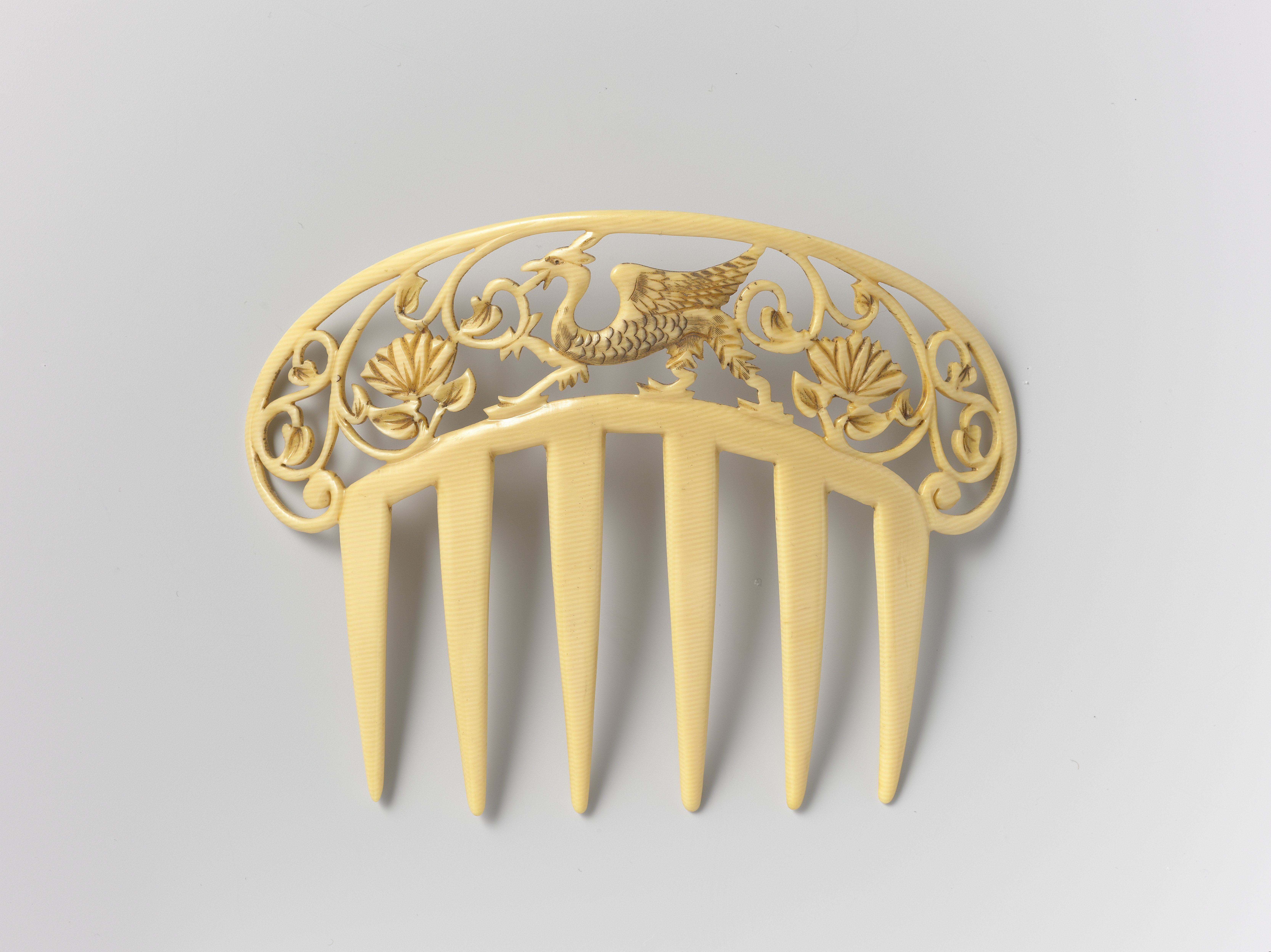 IdentificatieTitel(s): Haarkam van galalith met half ronde rug met een ajour gesneden draak in het middenObjecttype: kam (haarsieraad) Objectnummer: BK-1977-231Omschrijving: Haarkam van galalith met half ronde rug, Waar: op een ajour gesneden draak in het midden met aan beide kanten een lotusachtige bloem. Zes tanden.VervaardigingVervaardiger: vervaardiger: anoniemPlaats vervaardiging: NederlandDatering: ca. 1925 - ca. 1930Fysieke kenmerken: galalithMateriaal: galalith Techniek: ajourwerk / persen / zagen / vijlen / polijstenAfmetingen: h 9,5 cm. × b 12,5 cm. × d 3 cm. Verwerving en rechtenVerwerving: aankoop 1977Copyright: Publiek domein